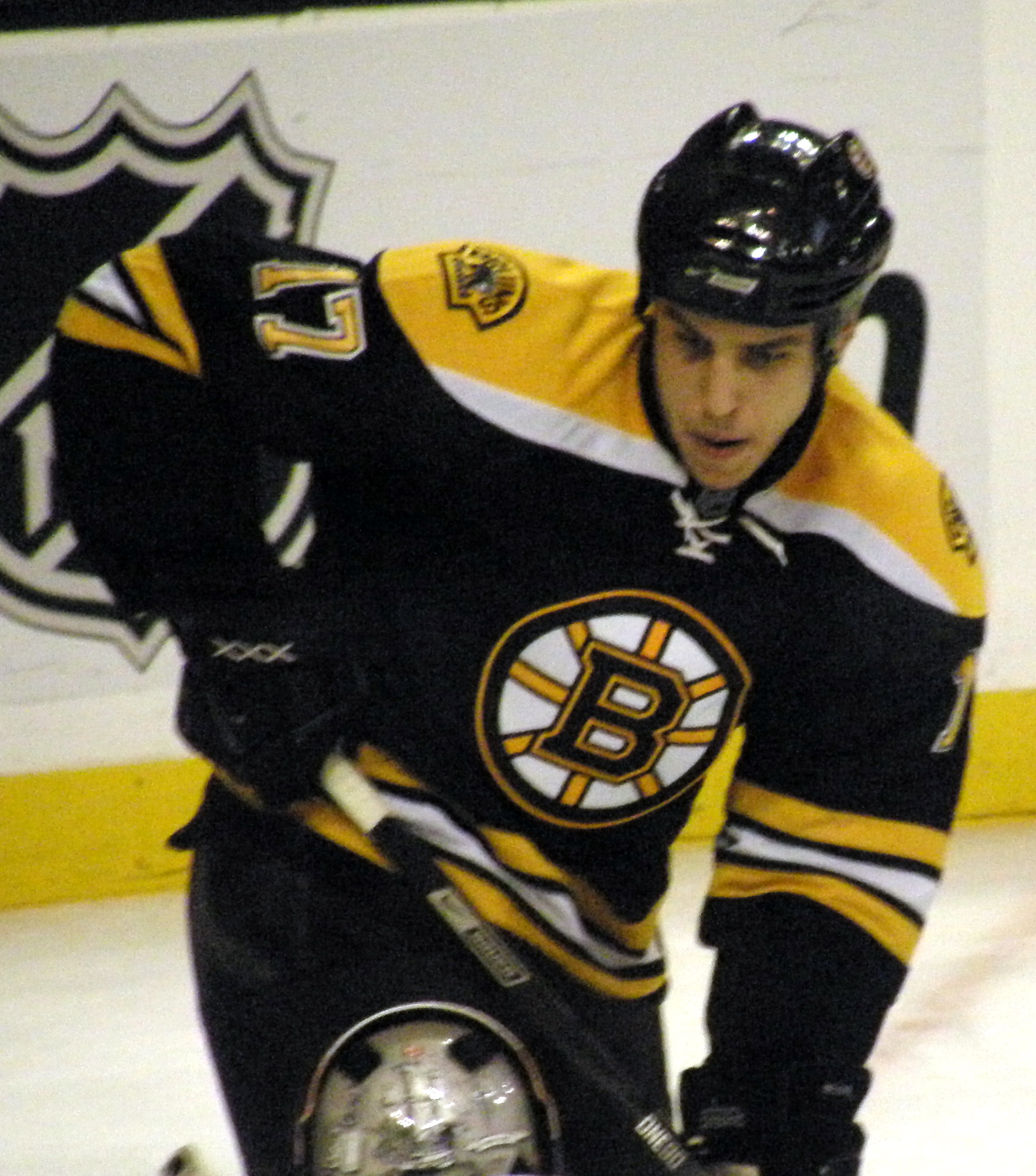 #17 Milan Lucic' (LW)